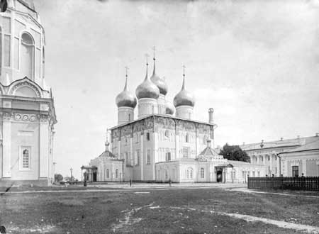 Успенский собор в Ярославле. Начало XX века.